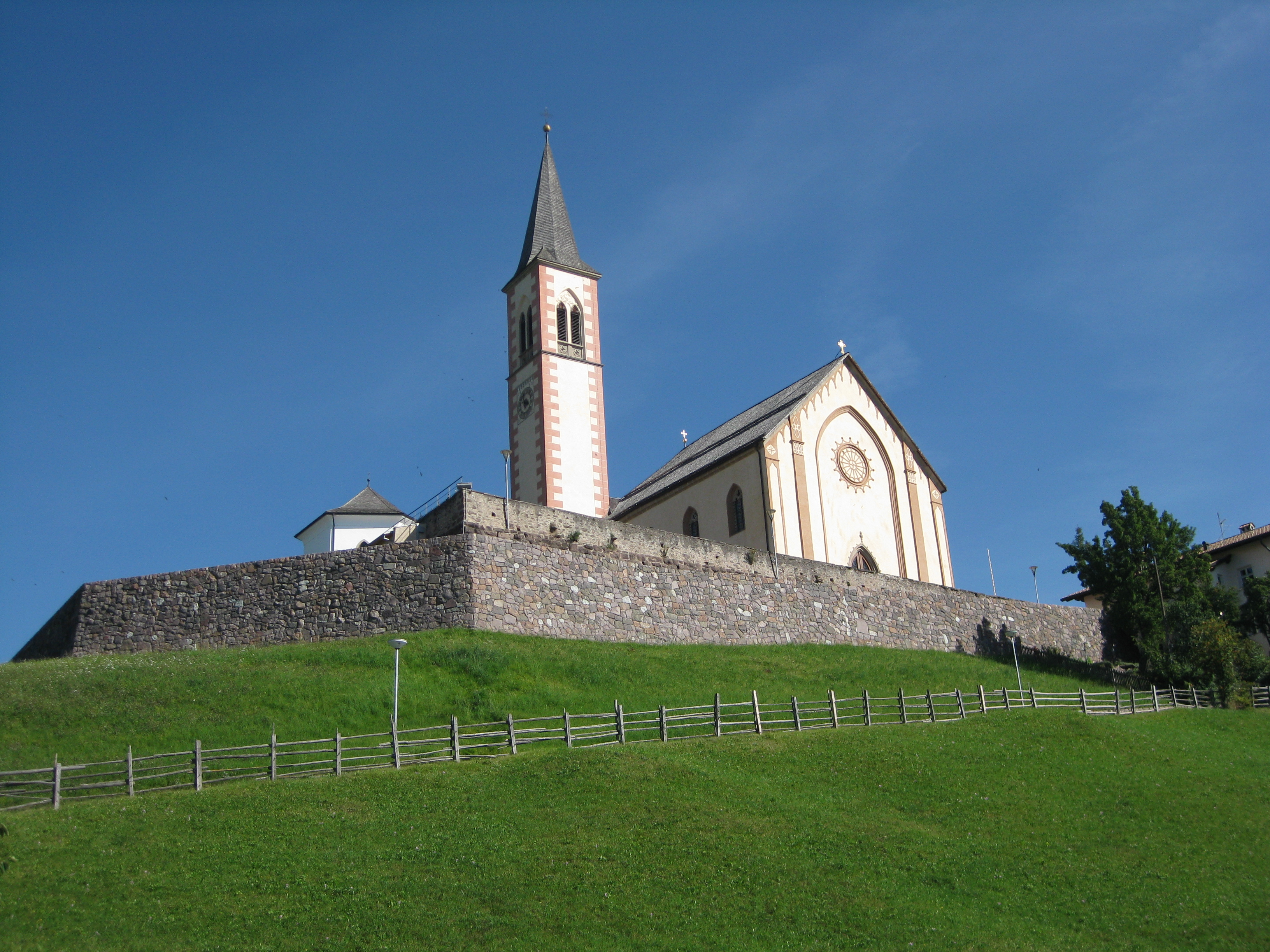 Pfarrkirche zum Heiligen Kreuz und St. Jakob und Helena in Aldein